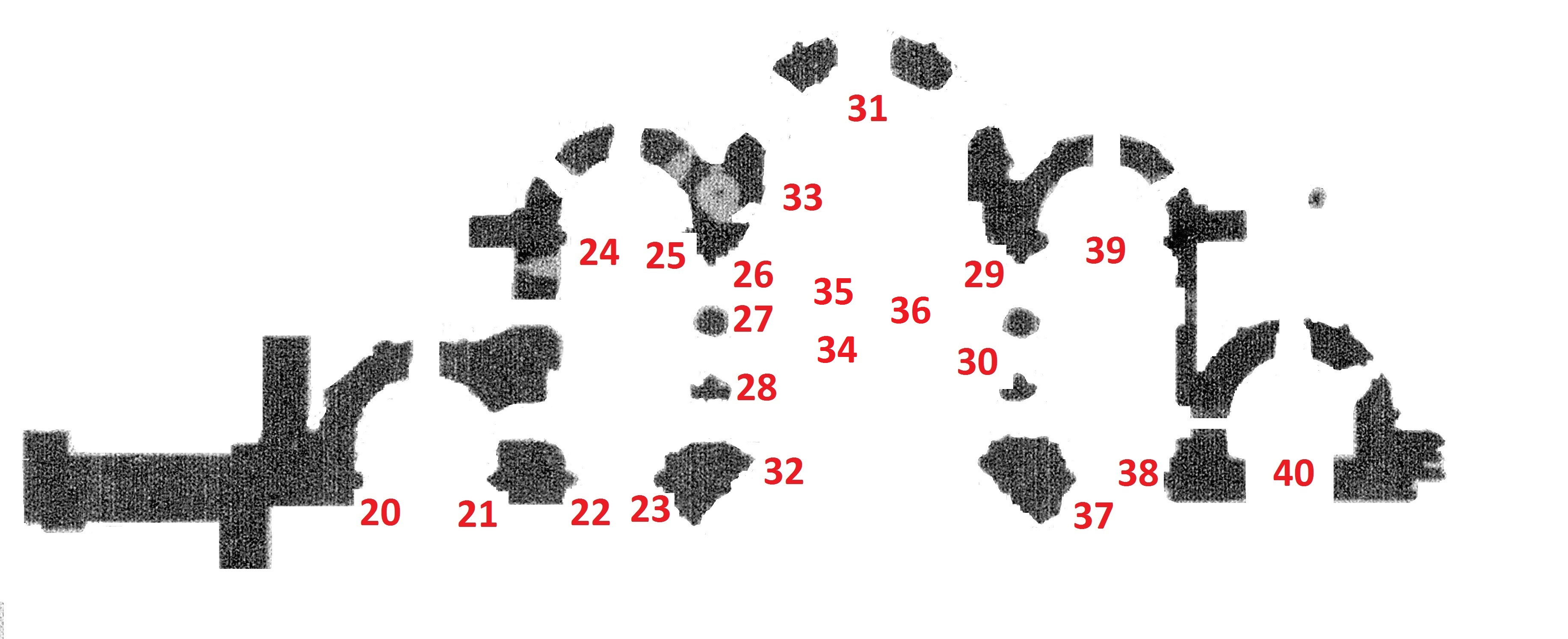 Emplacements des sculptures abbaye de la Sauve-Majeure (Gironde)